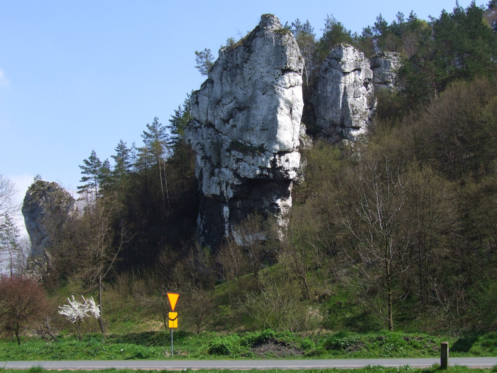 Skały Pochylce (Ojcowski Park Narodowy)